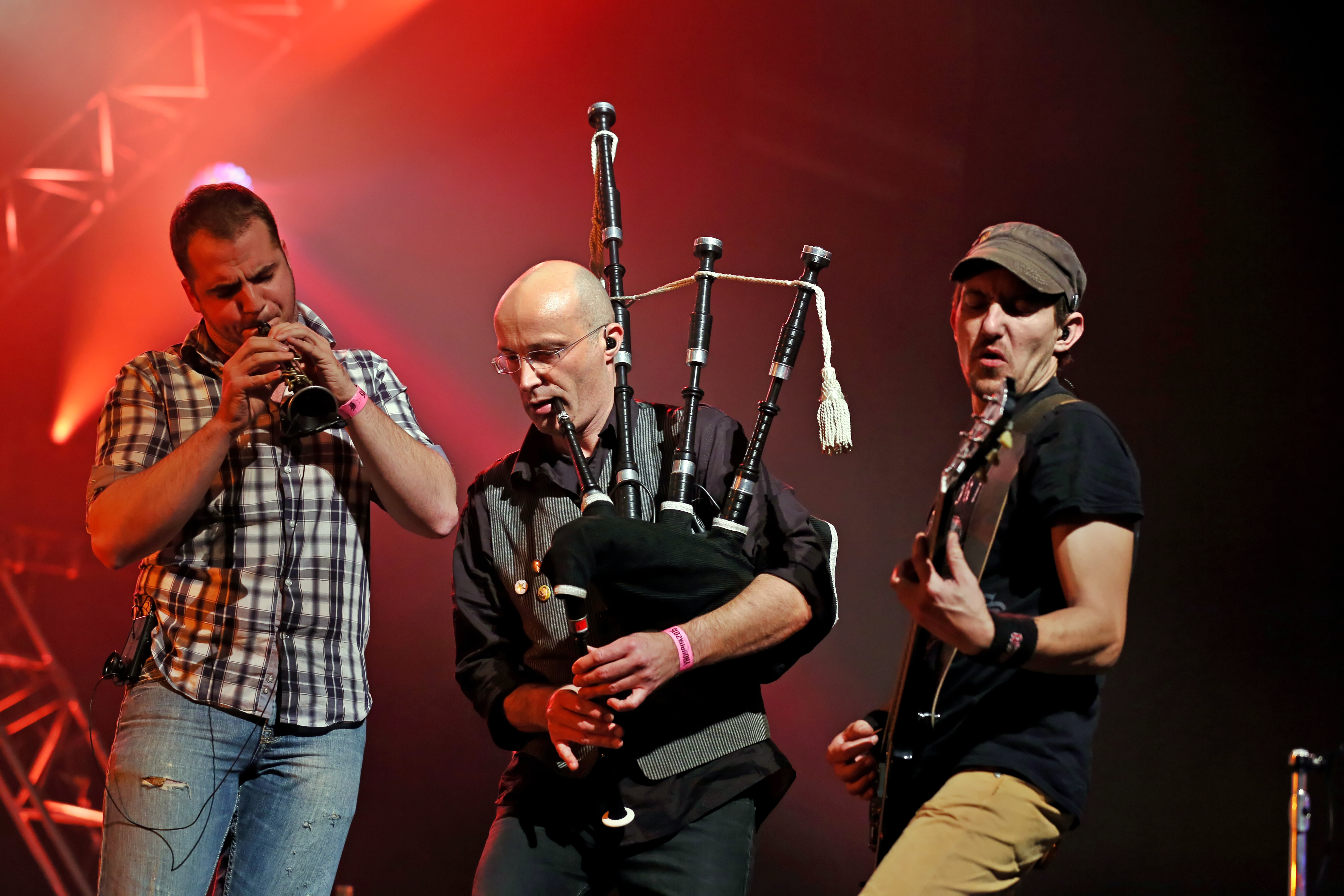 Création Alkeemia avec le groupe Digresk et l’orchestre symphonique des Deux Mondes dirigé par Philippe Hui lors du festival Yaouank le 21 novembre 2015 au Parc des Expositions de Rennes.